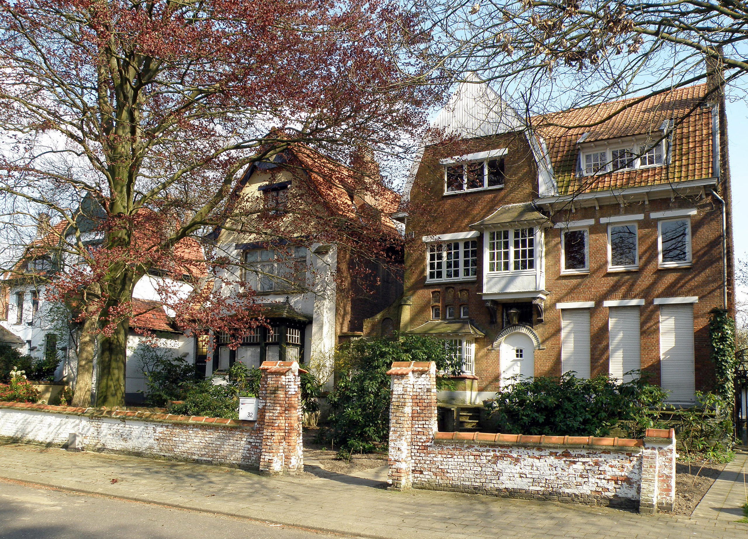 Mortsel bij Antwerpen (België). Landhuizen gelegen aan de Kapellelei, archit. Flor Van Reeth, anno 1909. In beeld: links, huis nr. 36, Schilderslust; midden, huis nr. 34, Villa Greta; rechts, huis nr. 32, De Witte Vaas.